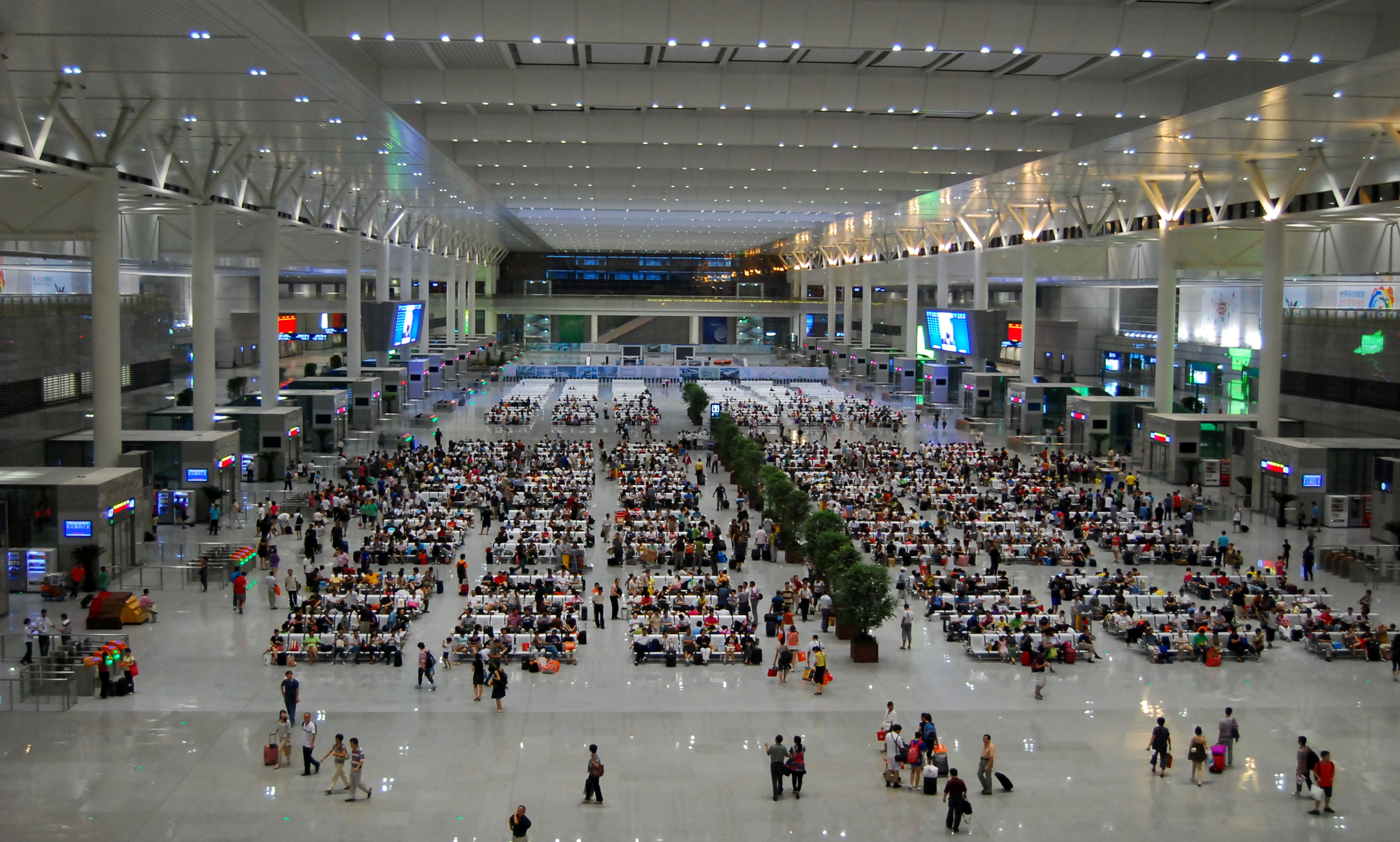 上海虹桥火车站候车大厅